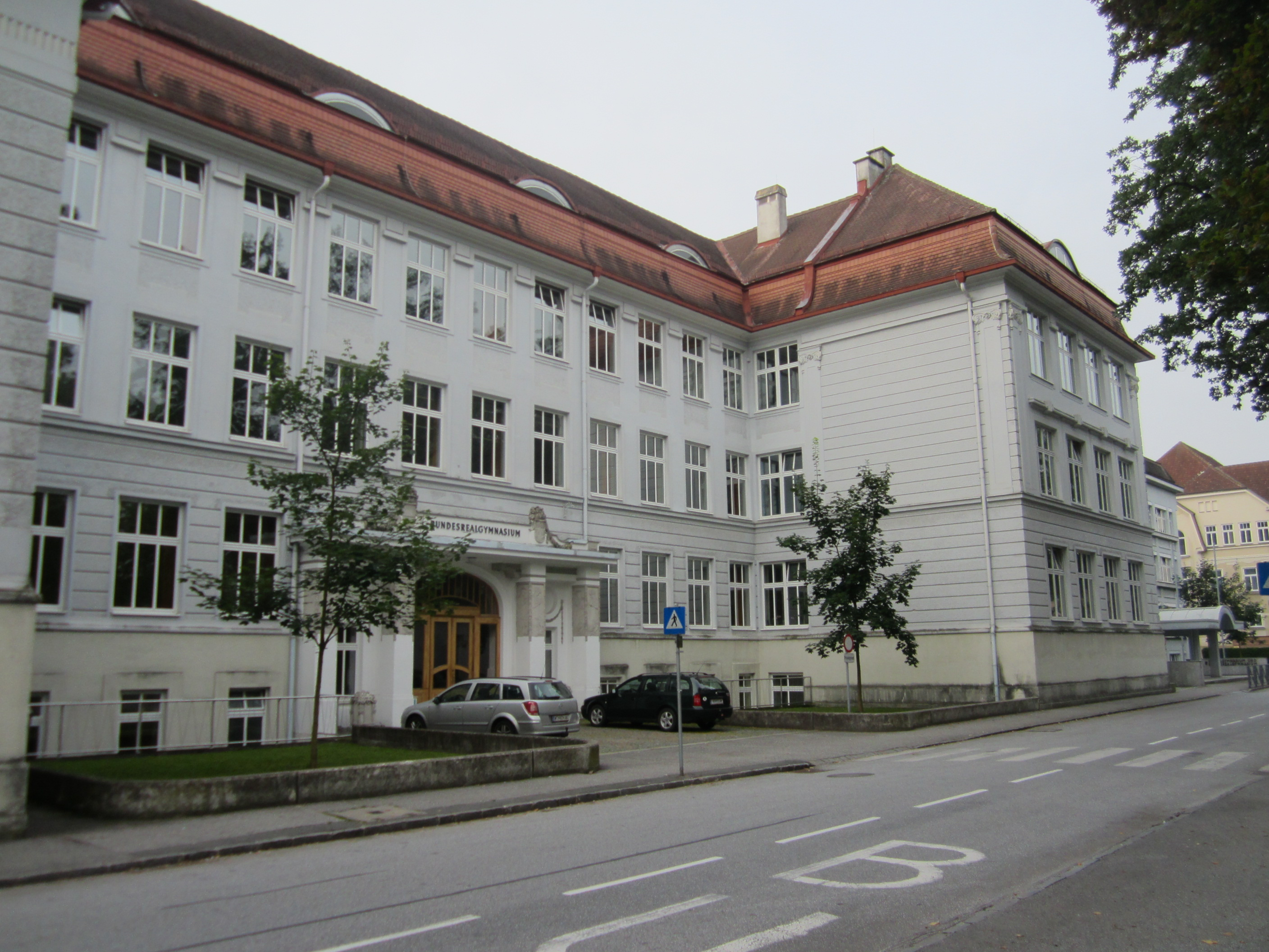 Bundesrealgymnasium in Waidhofen a. d. Thaya